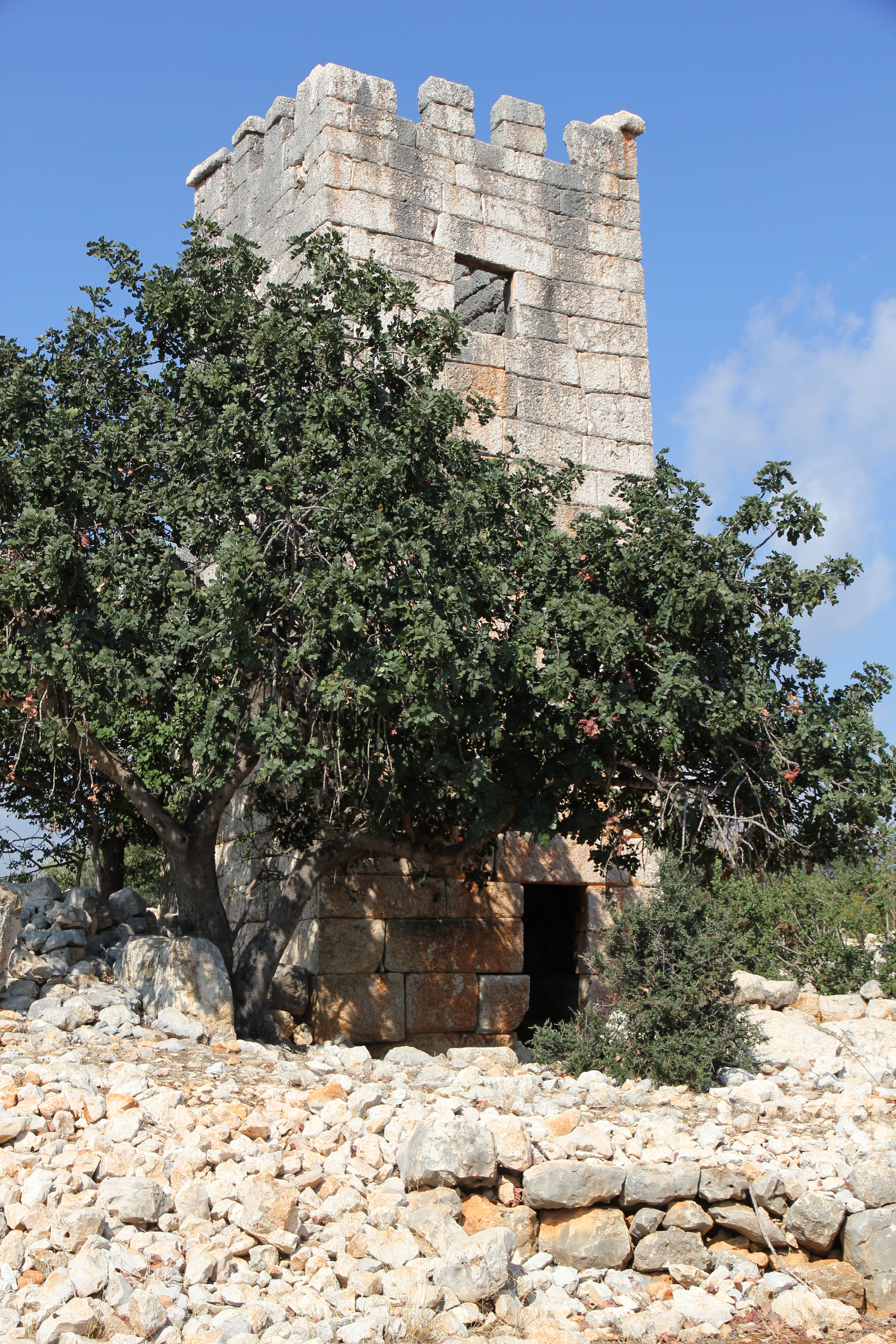 Gömeç, römischer Wachturm bei Kızkalesi, Südtürkei